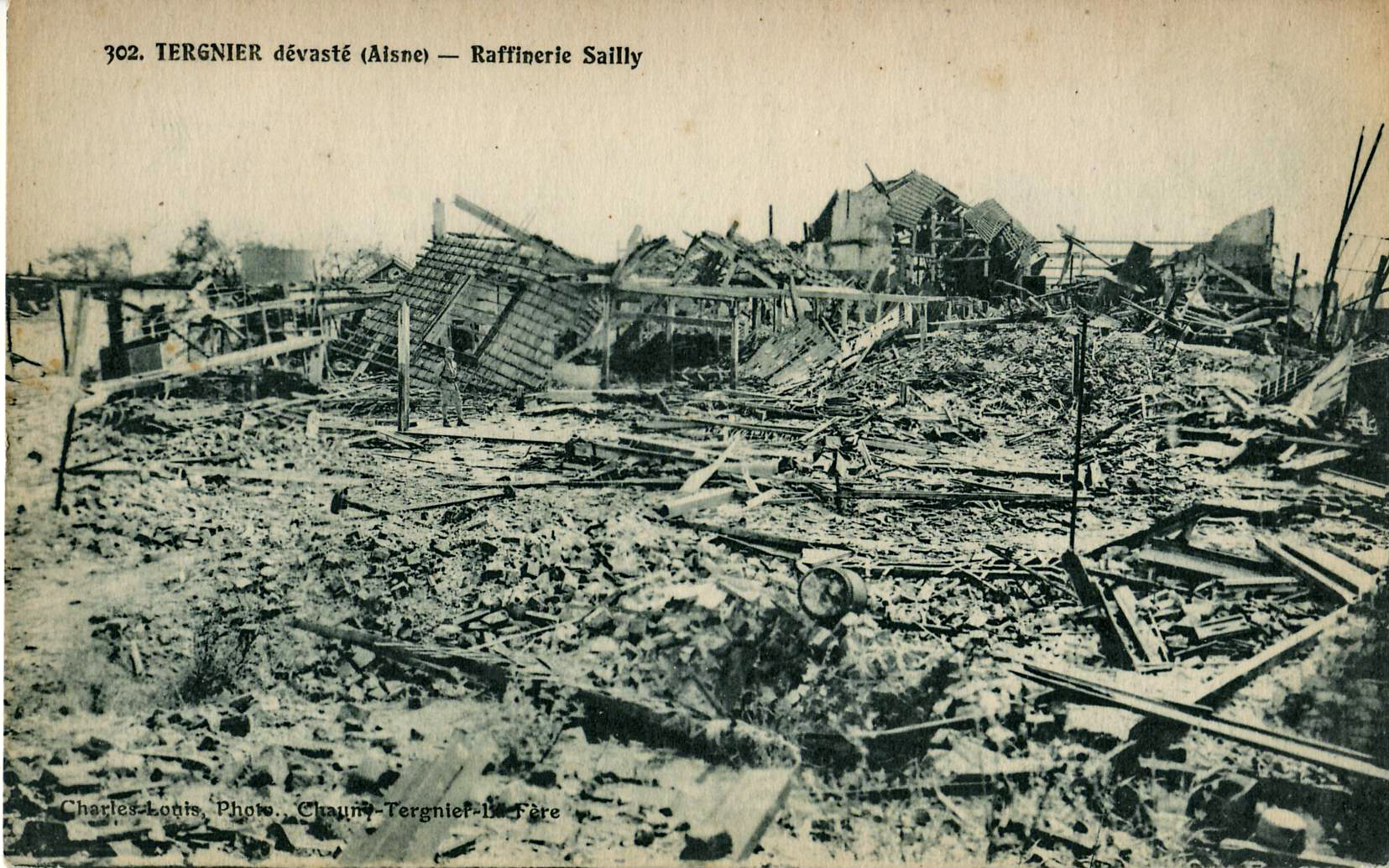 Carte postale ancienne éditée par Charles-Louis, photographe à Chauny-Tergnier-La Fère, n°302:TERGNIER DÉVASTÉ - Raffinerie Sailly